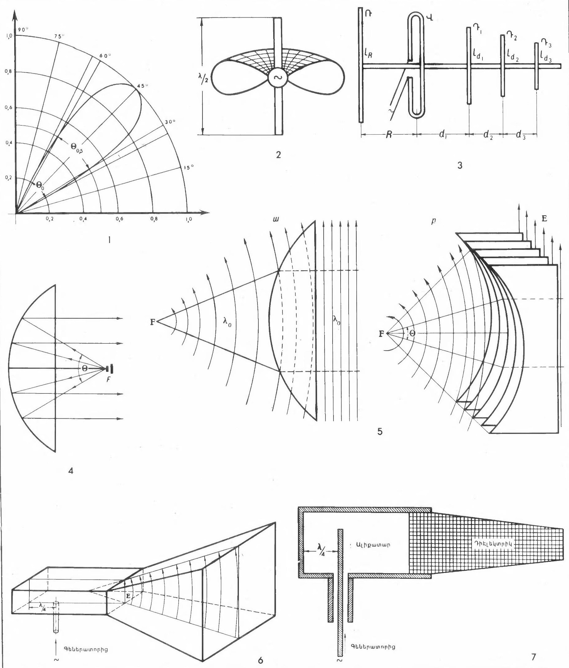 Անտենաներ։ 1. Անտենայի ուղղվածության ղիագրաման։ 2. Ժամաչափ վիբրատորը և նրա ստեղծած դաշտը։ 3. Դիրեկտորսւյին անտենա. Ռ ռեֆլեկտոր, Վ - ակտիվ վիբրատոր, Դ1, Դ2, Դ3 - դիրեկտորներ։ R = (0,15-0,25)λ, d1, d2, d3= (0,12-0,15)λ։ 4. Պարաբոլական անտենայի սխեմա։ 5. ա) Ոսսւնյակային դիէլեկտրիկ դանդաղեցնող անտենա, բ) Ոսպնյակային մետադաթիթեղային արագացնող անտենա։ 6. Շեփորաձև անտենա։ 7. Դիէլեկտրիկ անտենա։